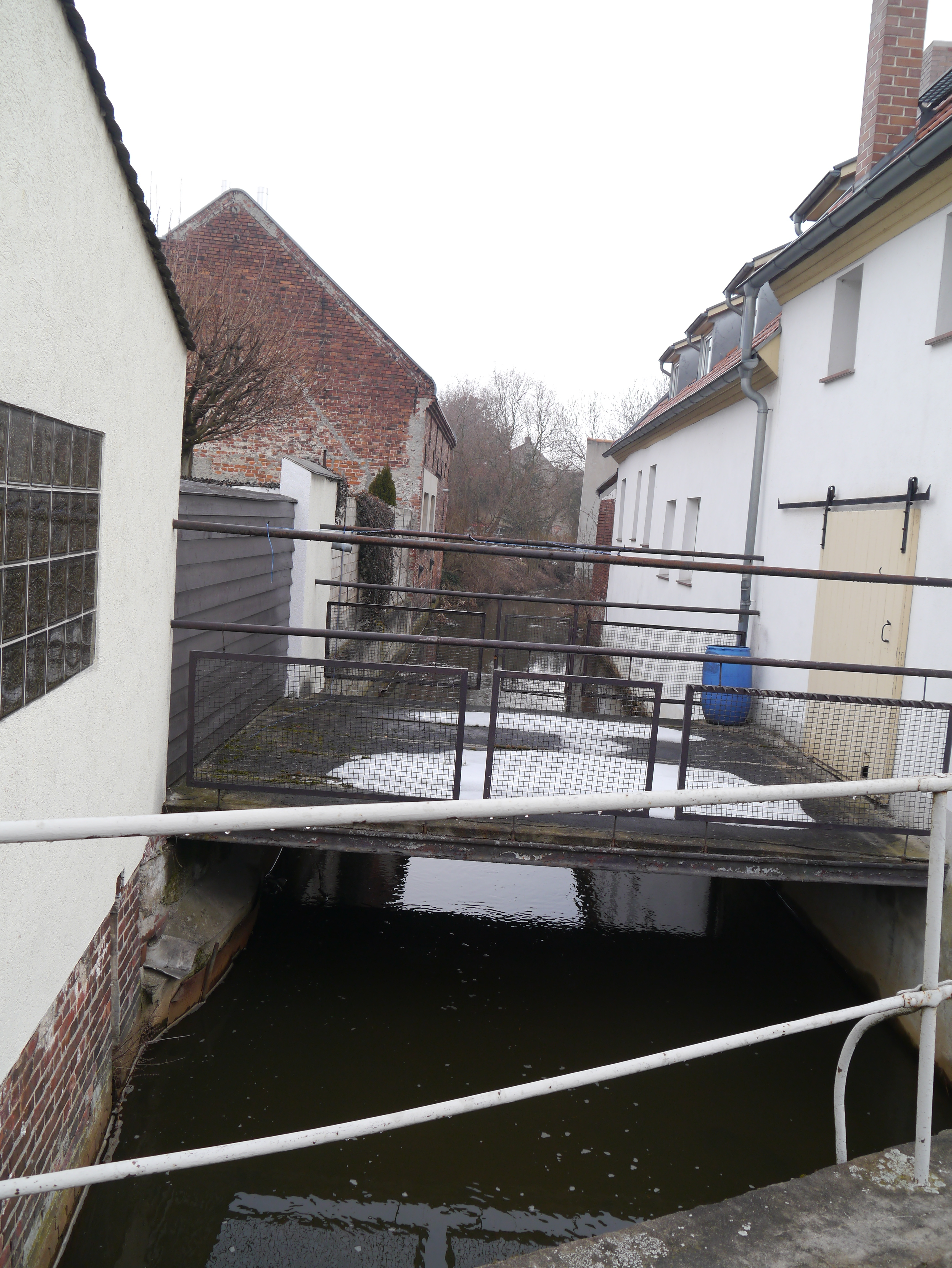 Mühlenstraße, Doberlug-Kirchhain, OT Kirchhain 2013.